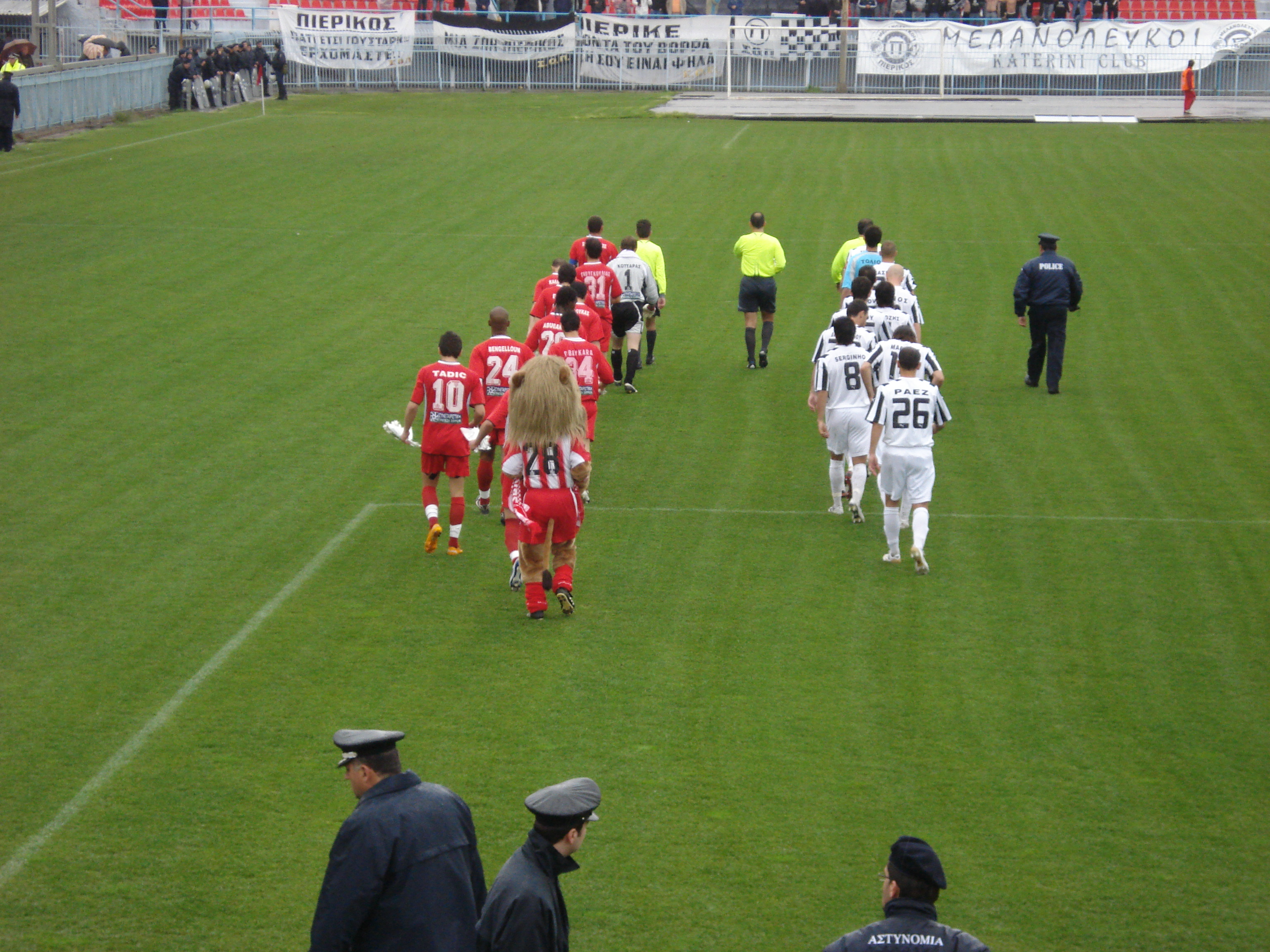 Panserraikos FC team lining up against Pierikos FC.